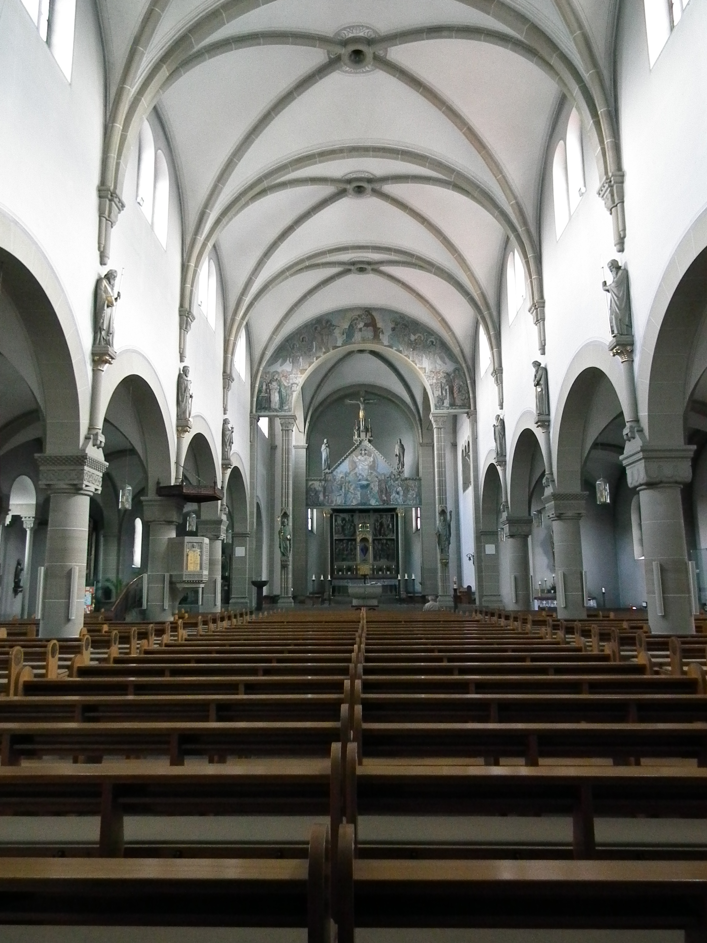 Inneres der katholischen Kirche St. Sebastian in Ketsch (Baden-Württemberg, Deutschland)